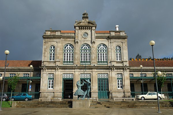 Viana do Castelo Train station